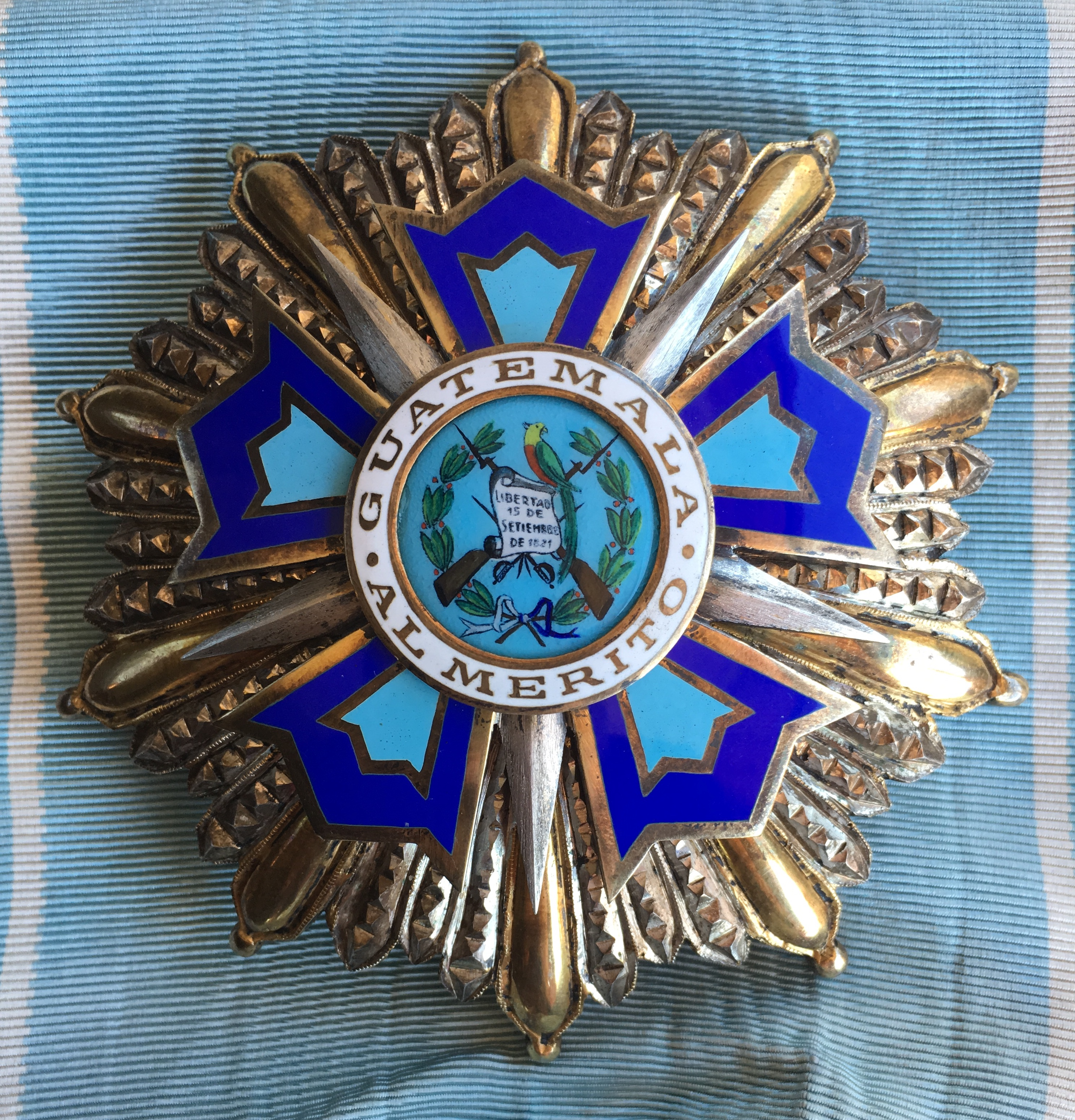 Placa de Gran Cruz de la Orden del Quetzal, República de Guatemala. Fabricada por Gardino (Roma). Parte de las AEA Collections.